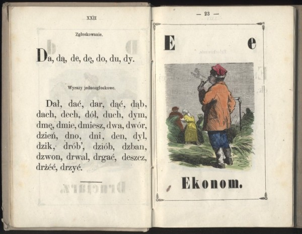 Ekonom rycina - Teofil Stanisław Nowosielski. Warszawa, 1866.